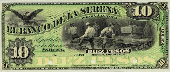 Billete de 10 pesos emitido por el Banco de La Serena en 1891.